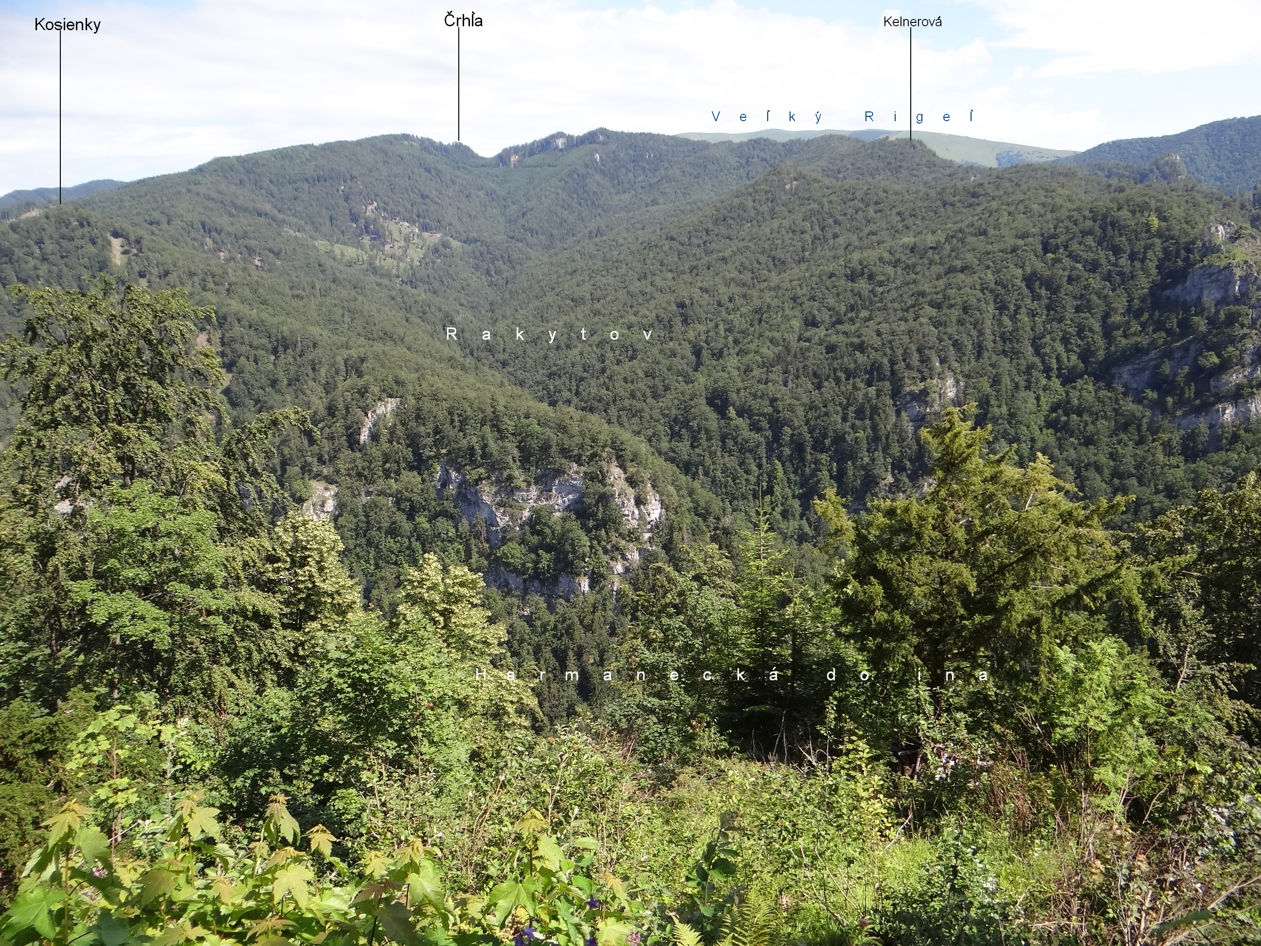 Widok spod Jaskini Harmanoieckiej